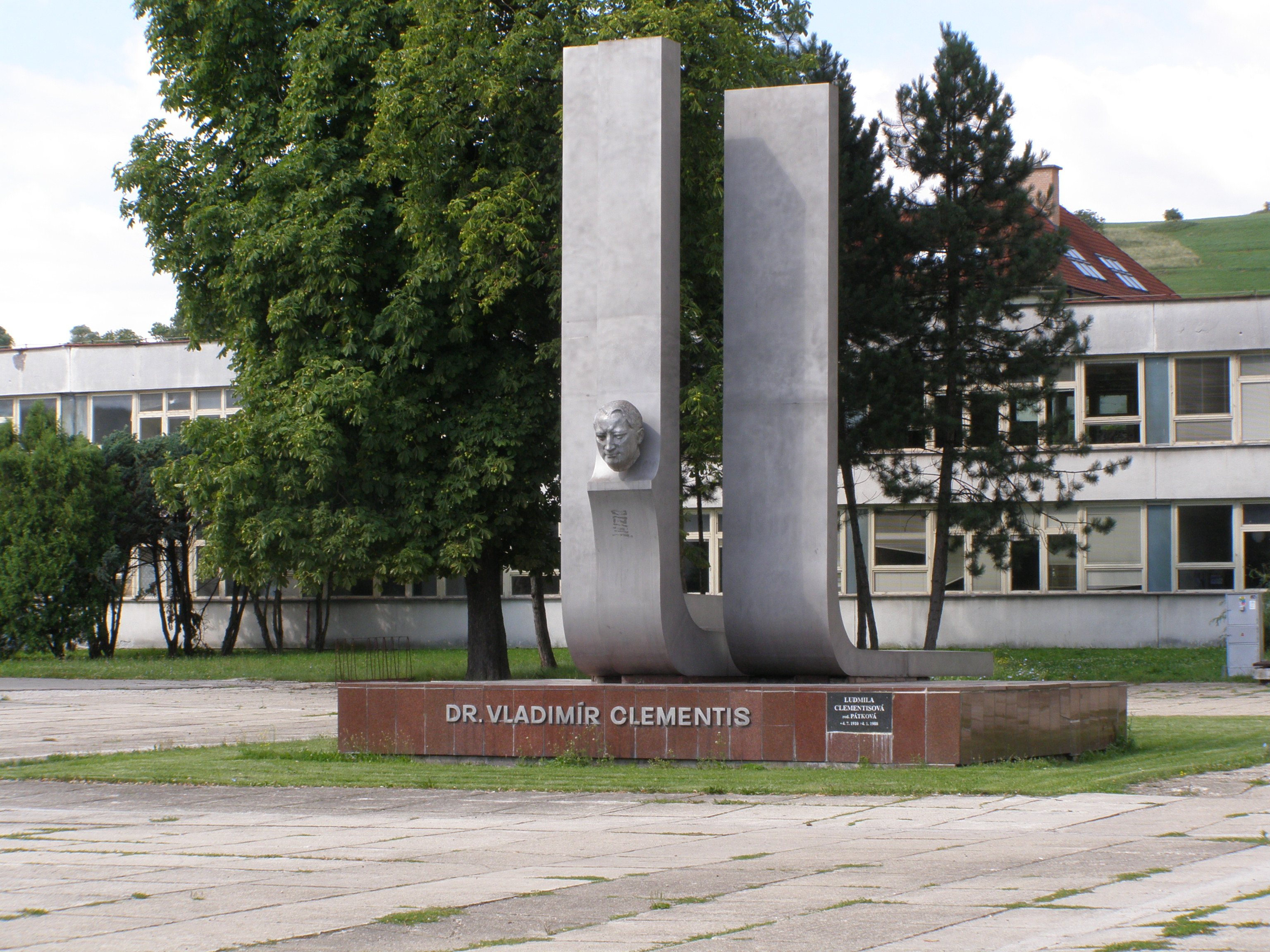 Tisovec (okres Rimavská Sobota), Náměstí Dr. V. Clementise